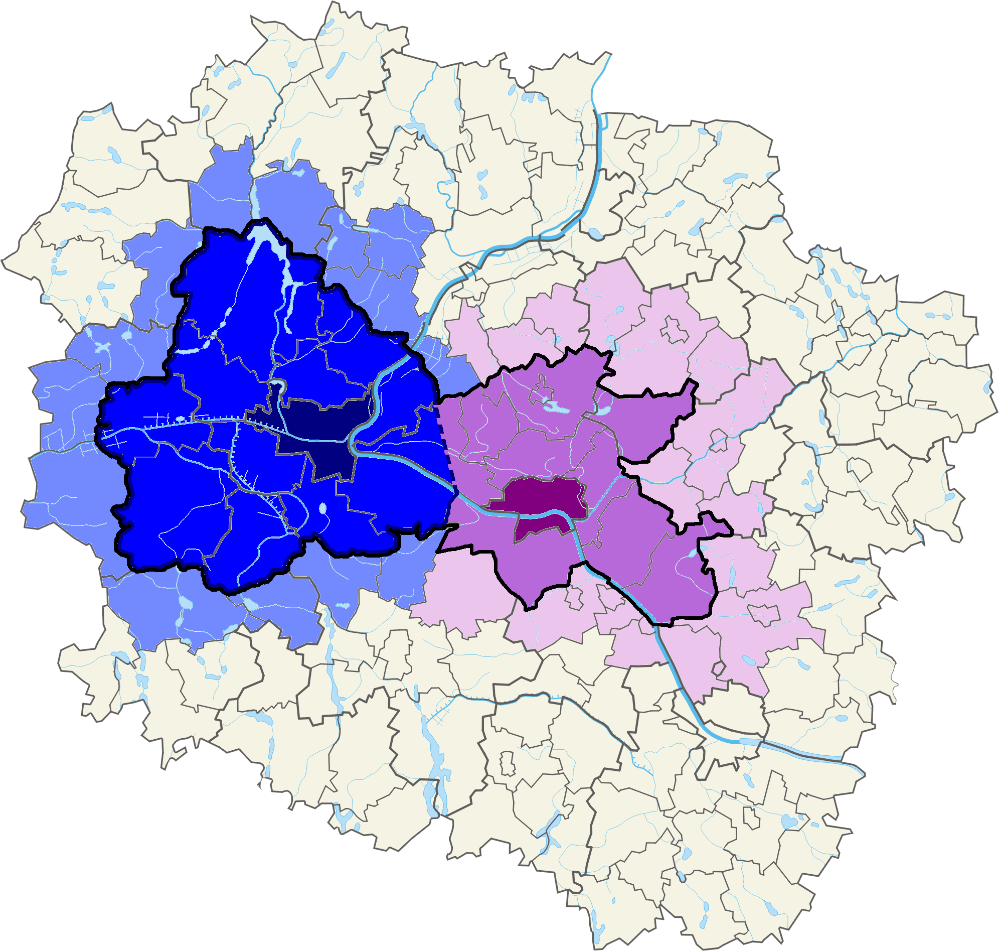 Mapa Bydgosko-Toruńskiego Obszaru Funkcjonalnego wyznaczonego na podstawie porozumienia z 8 kwietnia 2014 roku na podstawie: "Delimitacja i charakterystyka obszaru realizacji instrumentu Zintegrowanych Inwestycji Terytorialnych w obszarze funkcjonalnym Bydgoszczy i Torunia. Zarząd Województwa Kujawsko-Pomorskiego. marzec 2014" oraz "Delimitacja dla Miejskich Obszarów Funkcjonalnych Bydgoszczy i Torunia. opracowanie eksperckie Deloitte. Warszawa 30 czerwca 2014"